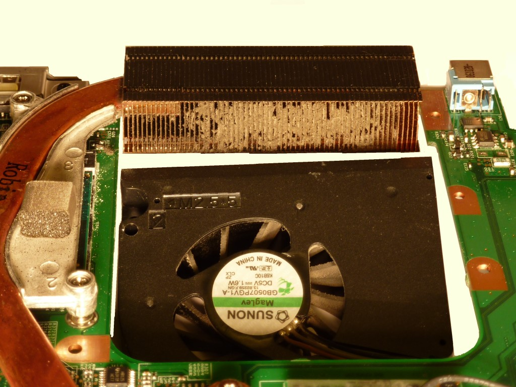 mit Staub verschmutzter Kühlkörper aus einem Laptop, der zum Abschalten des Gerätes geführt hatte